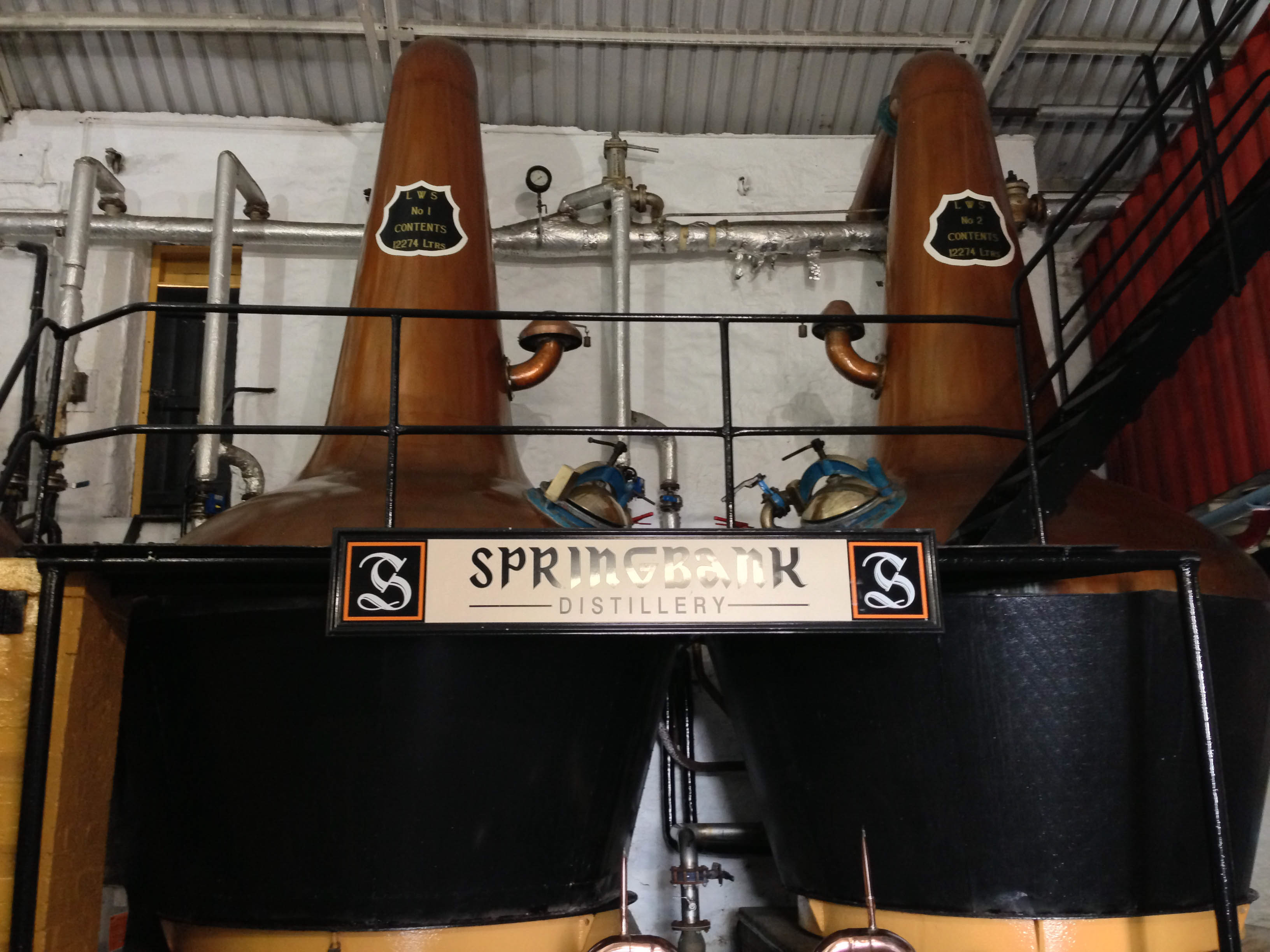 Stills